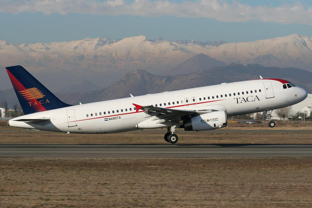 A320 au décollage de Santiago du Chili le 10 août 2007 Source Je suis le propriétaire de cette image